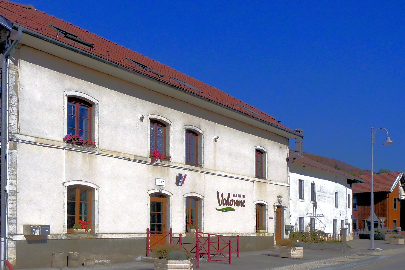 La mairie de Valonne